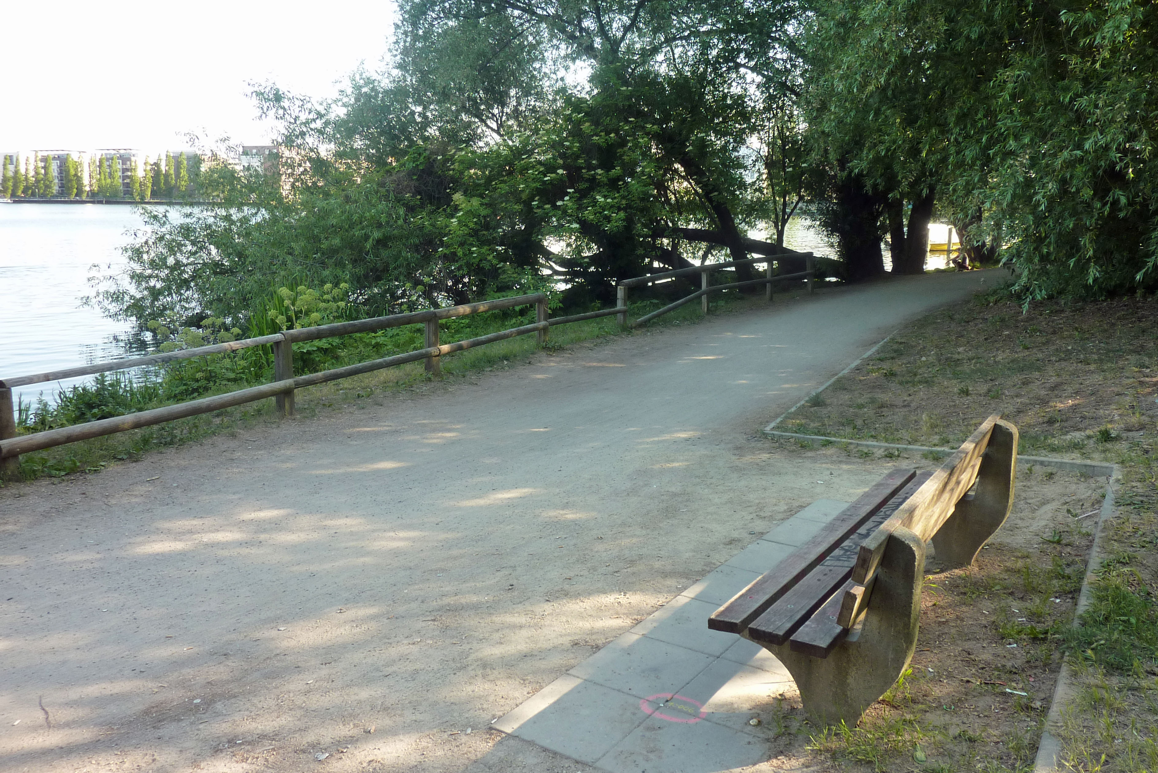 Paul-und-Paula-Ufer in Berlin-Rummelsburg. Blickrichtung Süden.